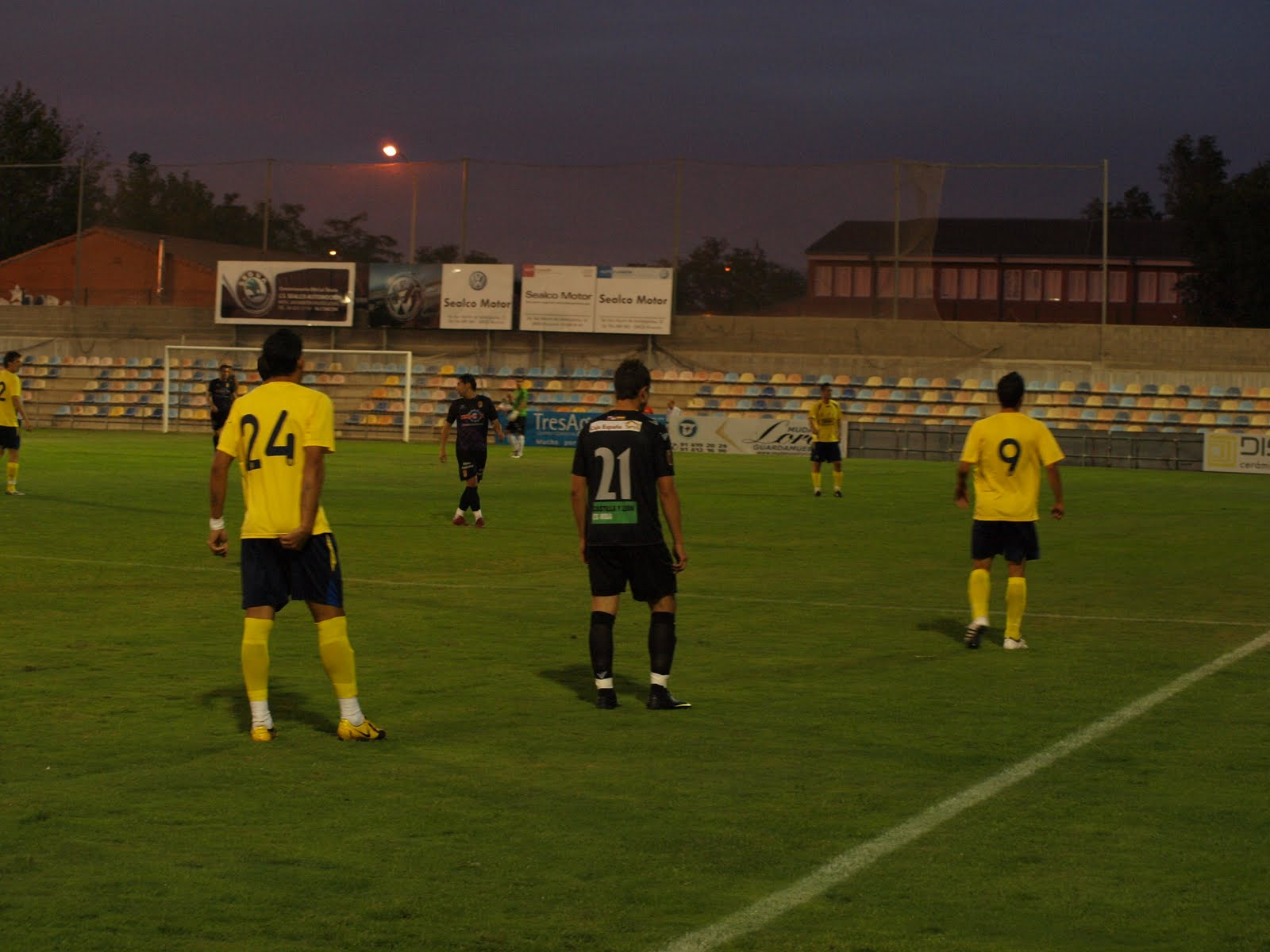 Partido de la Agrupación Deportiva Alcorcón en su estadio de Santo Domingo. Liga de Segunda B, temporada 2009-10.